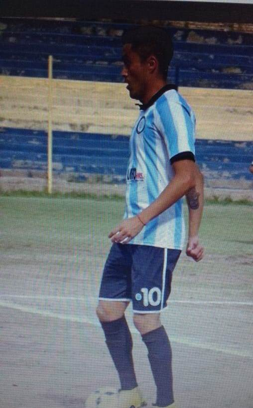 Matías José Guardia Torres